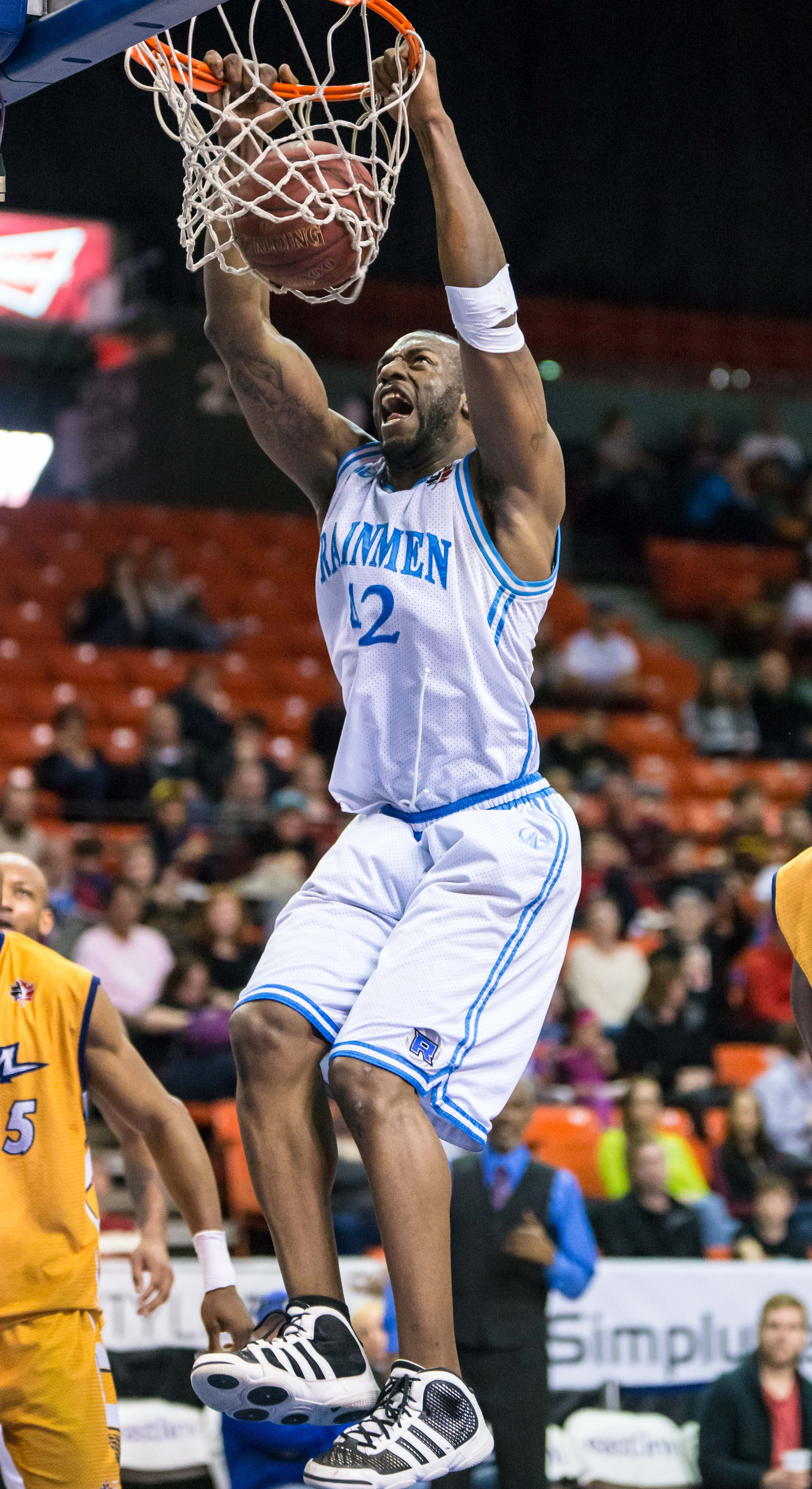 _MMP4710.jpg